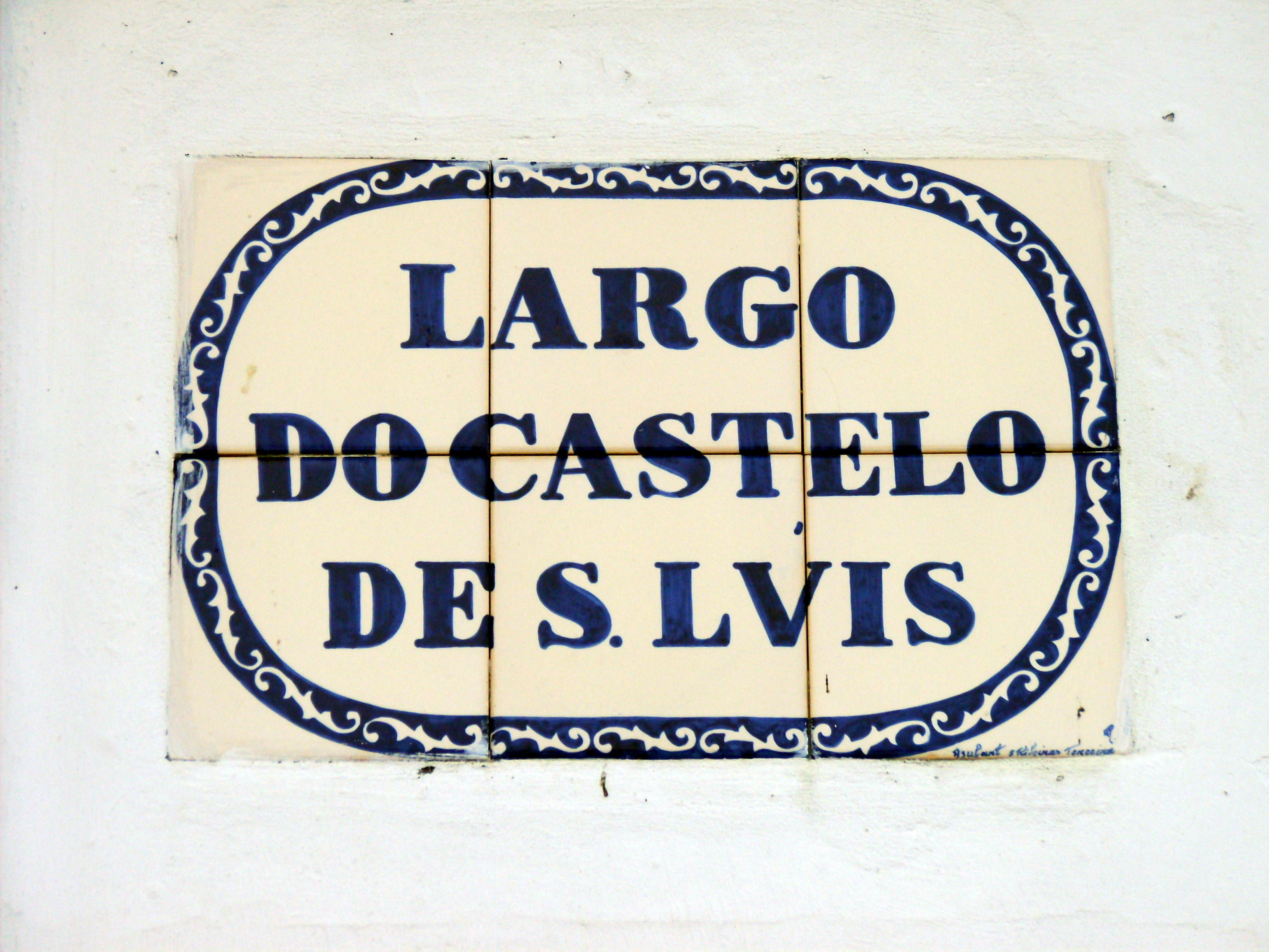 Castelo de São Luís, Angra do Heroísmo, Ilha Terceira, Açores: placa indicativa do atual largo, aberto onde se erguia a fortificação.